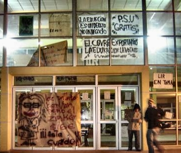 Al igual que la mayoría de los liceos municipalizados de Chile, el 2006 el Liceo Isidora Ramos de Lebu estuvo tomado por sus estudiantes para presionar al gobinerno a modificar la LOCE y realizar mejoras a la educación.